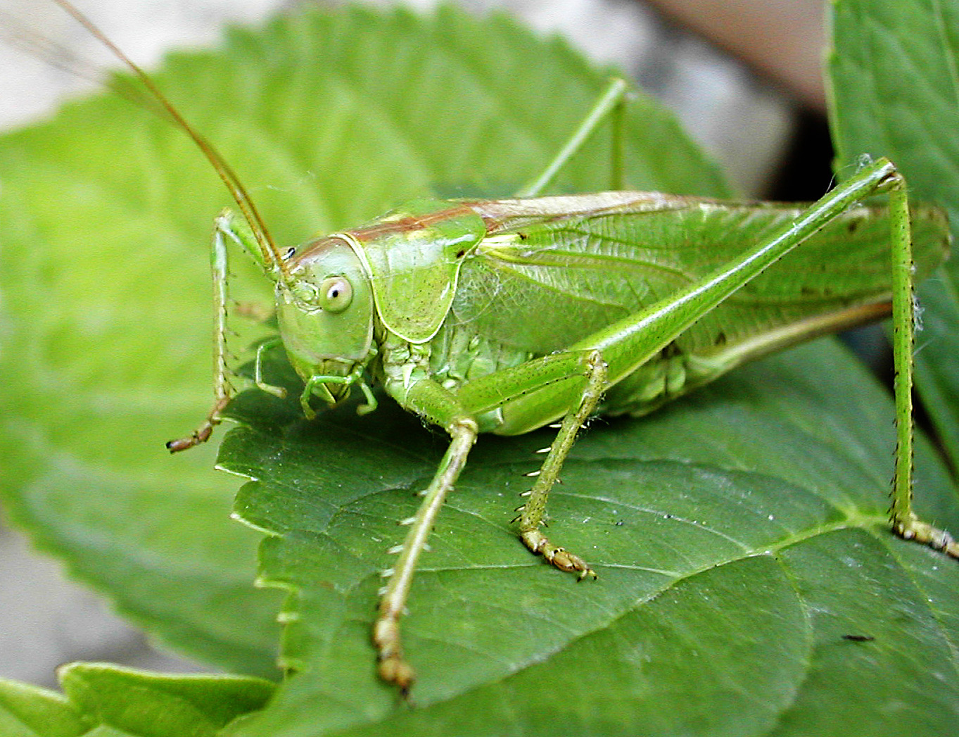 Criquet (grand)